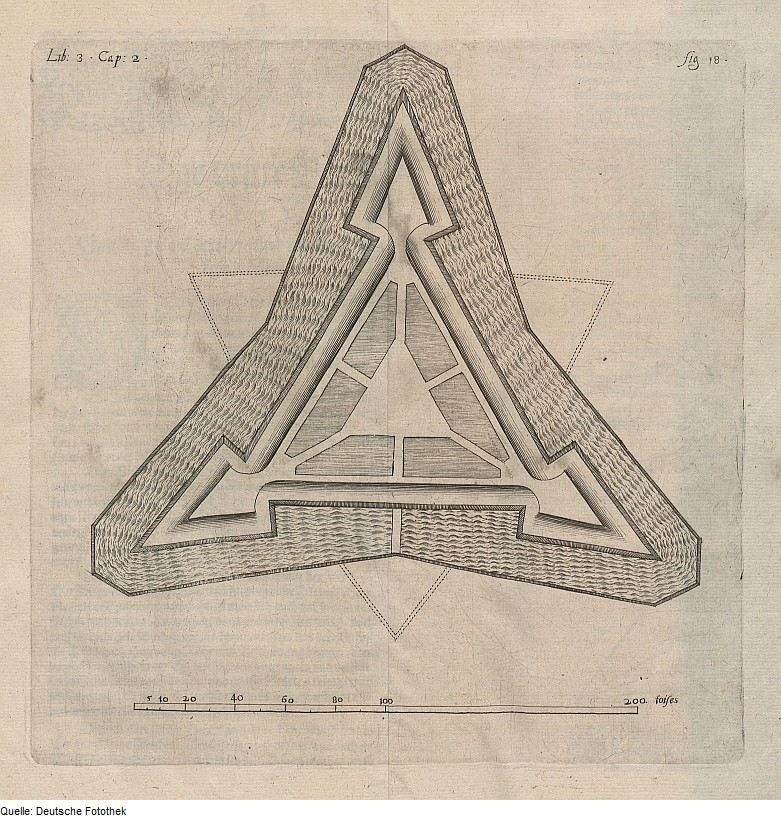 Original image description from the Deutsche Fotothek Architektur & Festung & Grundriss